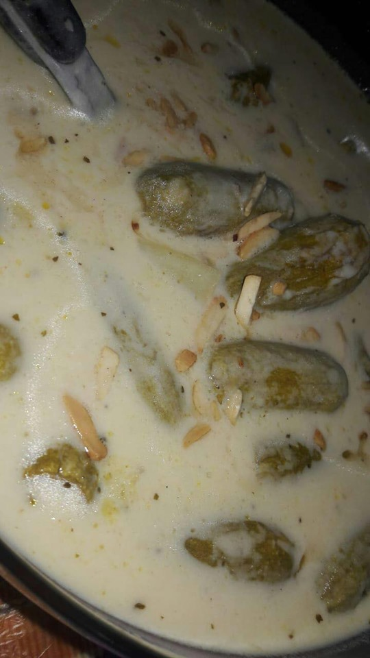 المخشي بلبن أحد أشهر الأطباق الشامية المشهورة التي تتكون من الكوسا (بشكل خاص) وباقي الخضروات بشكل عام، سمي بالمخشي بسبب حشوته المختلفة عن باقي المحاشي فهي تتكون فقط من اللحم ولا يضاف الأرز